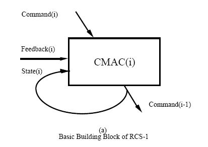 RCS-1 control paradigm